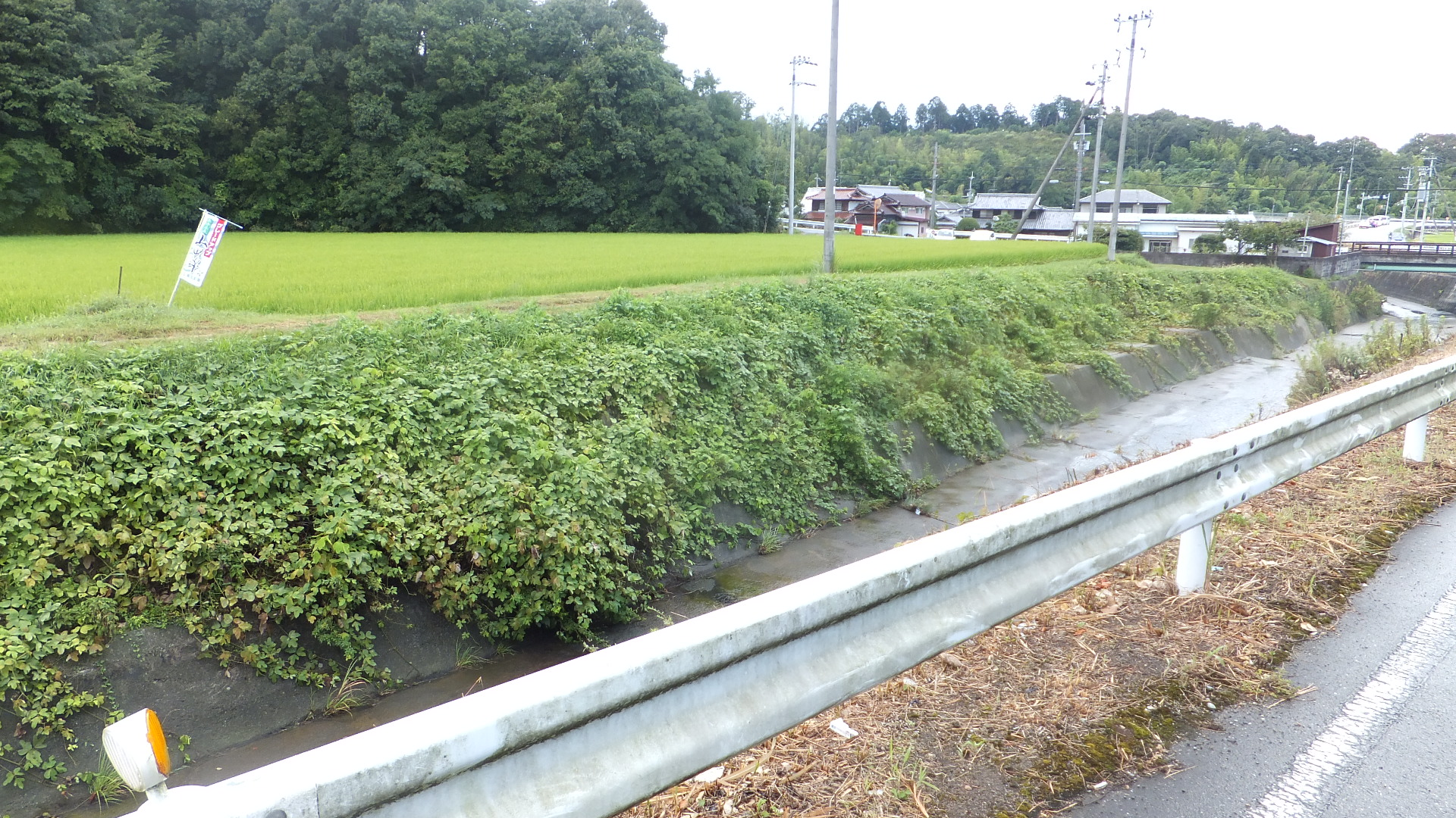 細目川 （ 兵庫県三木市志染町細目）